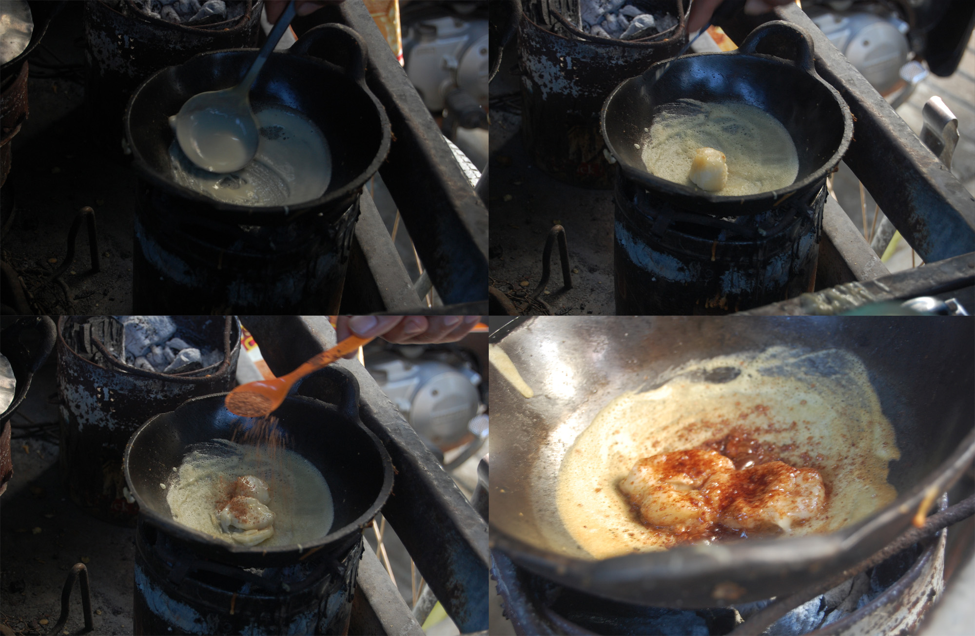 Proses pembuatan Leker.